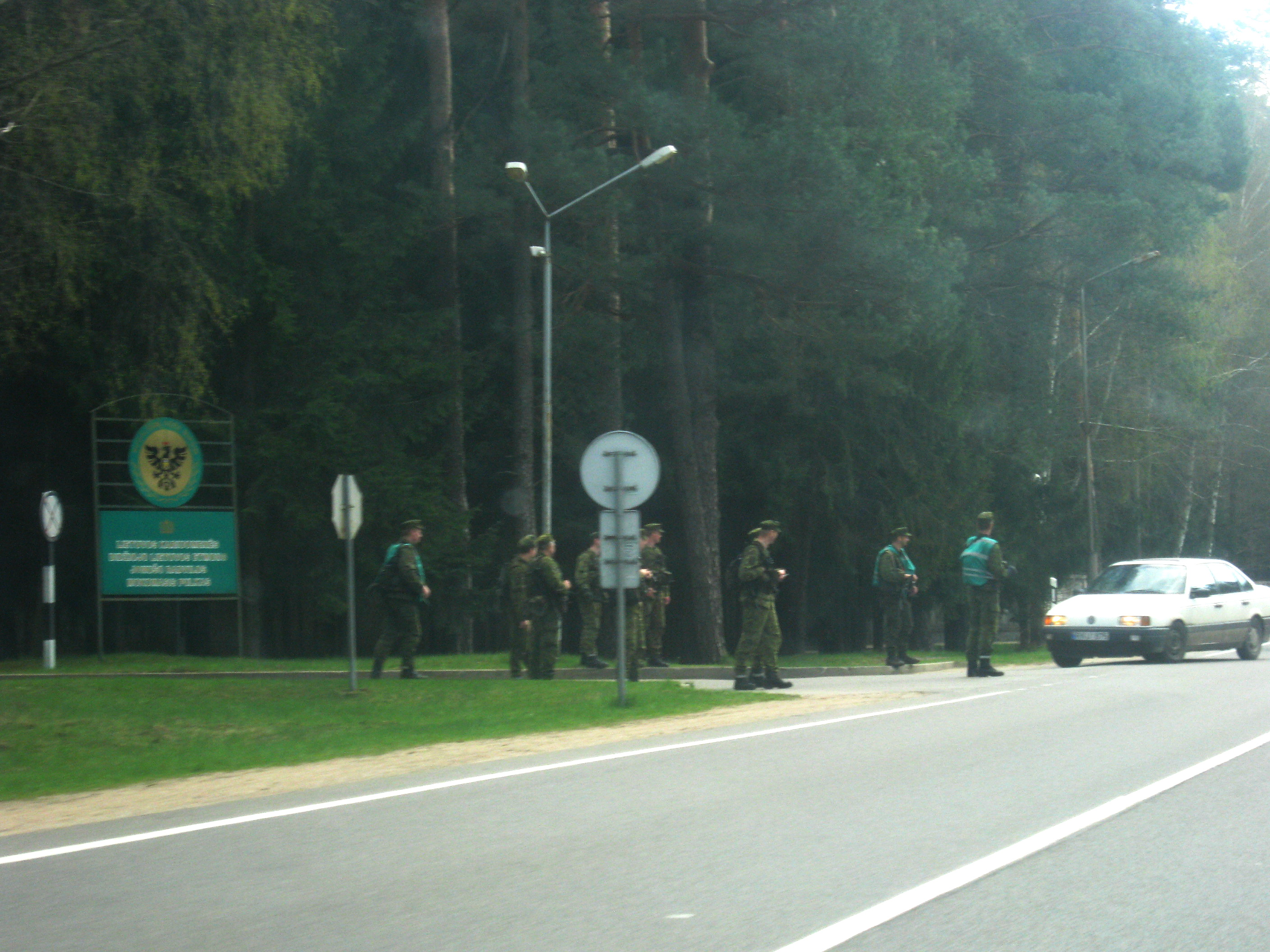 Mokomasis pulkas žengia į pratybas